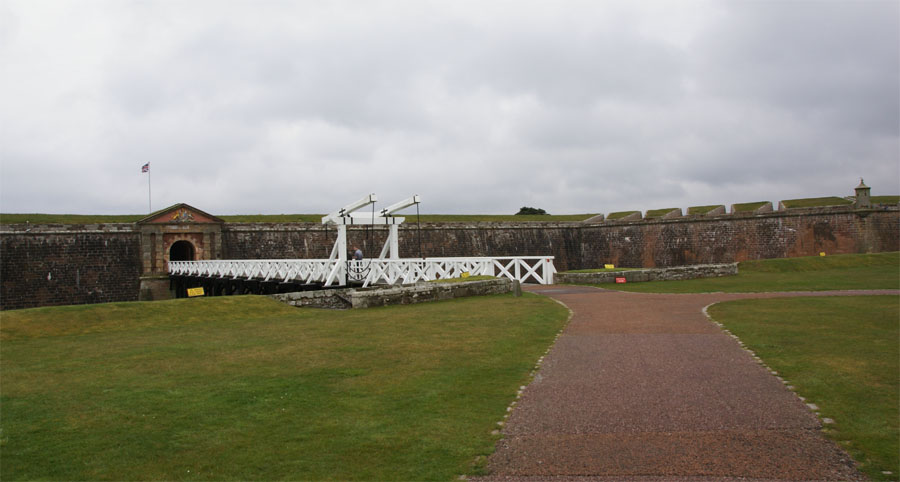 Fort George, Ardersier (Scotland) - main entrance